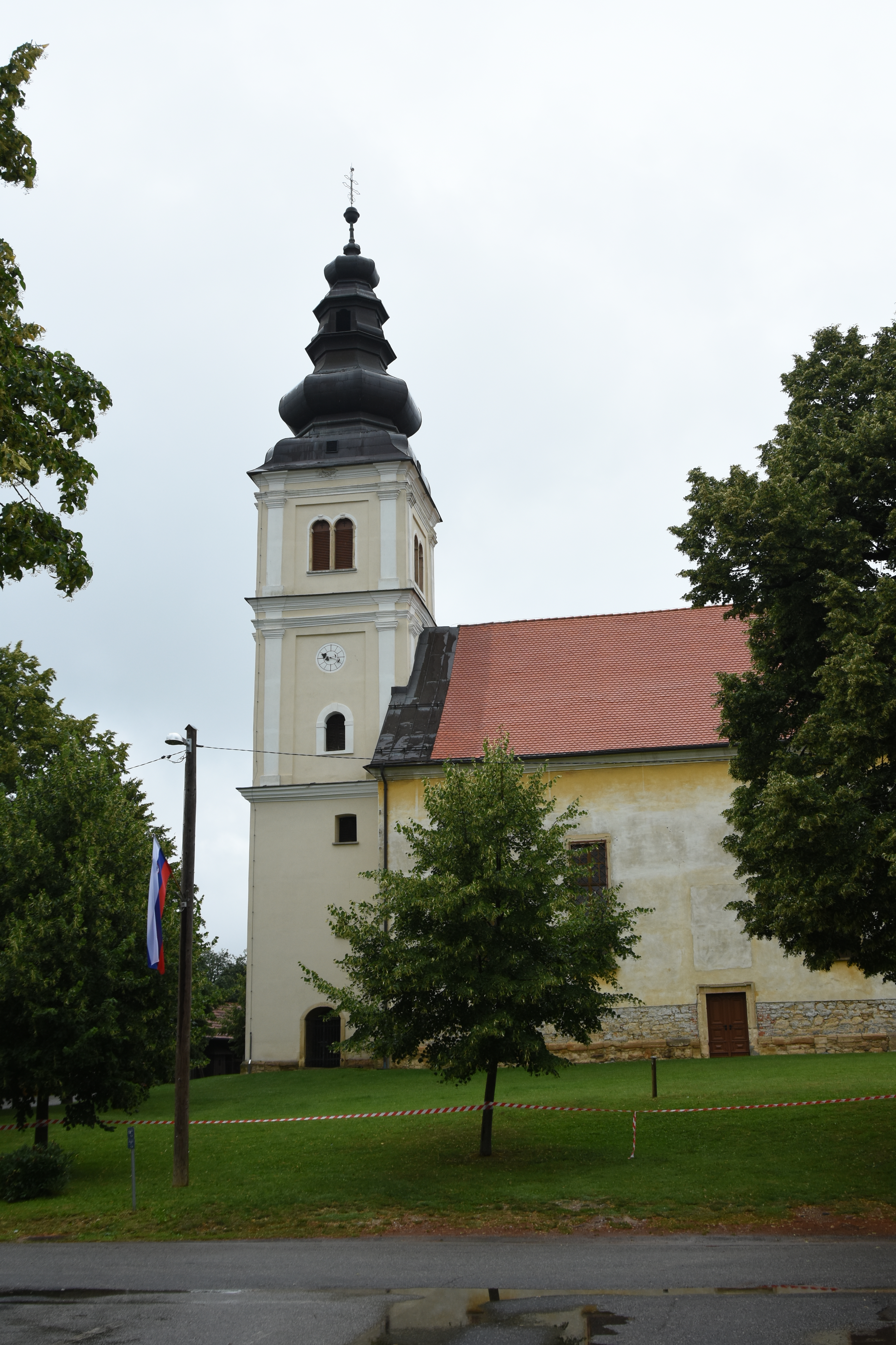 Cerkev sv. Duha, Stara Gora (Sveti Jurij ob Ščavnici)